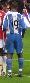 Titus Bramble